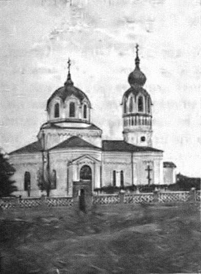 Беларуская (тарашкевіца): Дзісна (Dzisna), вуліца Замкавая (vulica Zamkavaja). Васкрасенская царква-мураўёўка